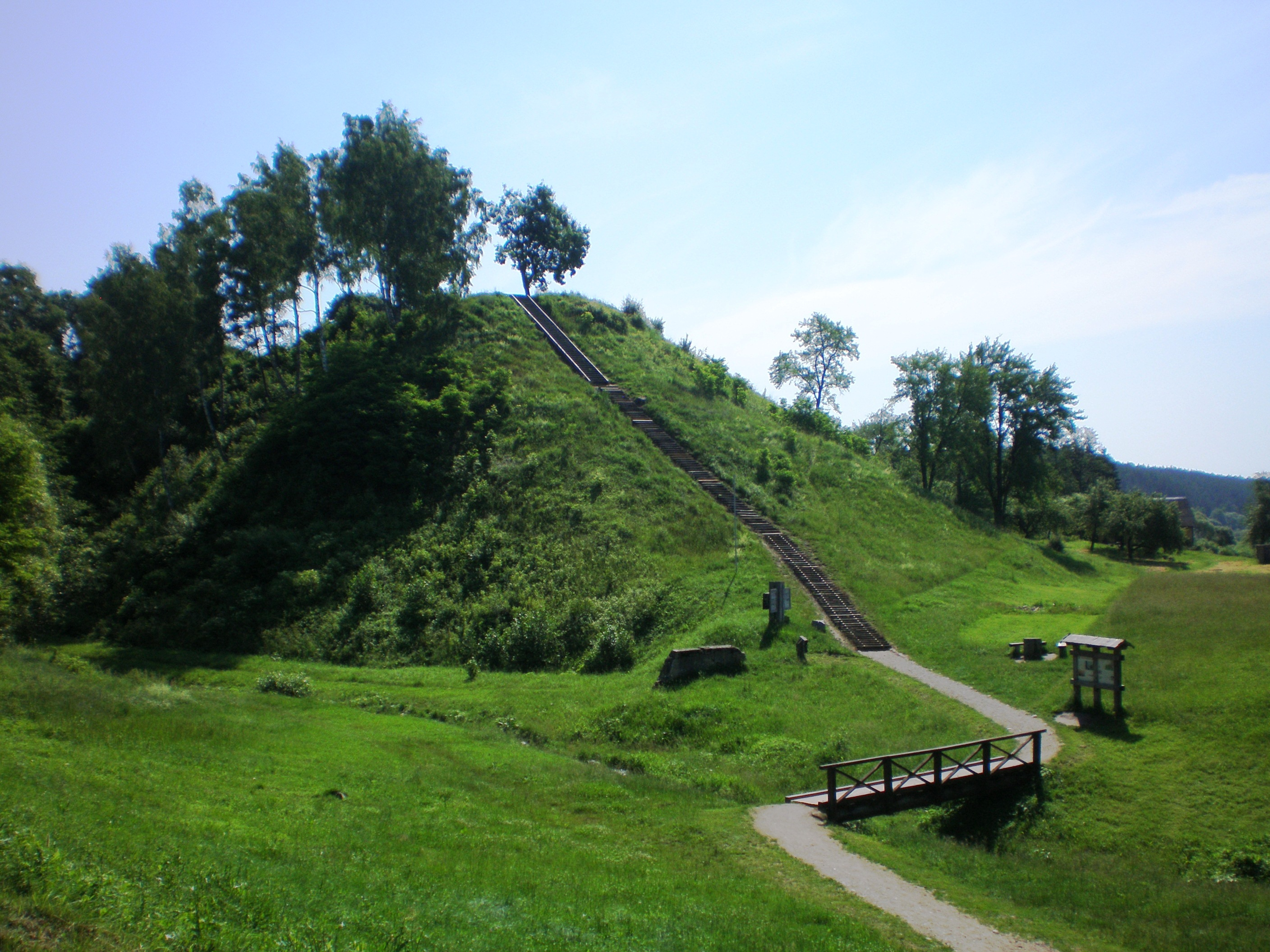 Merkinės piliakalnis, Varėnos raj.